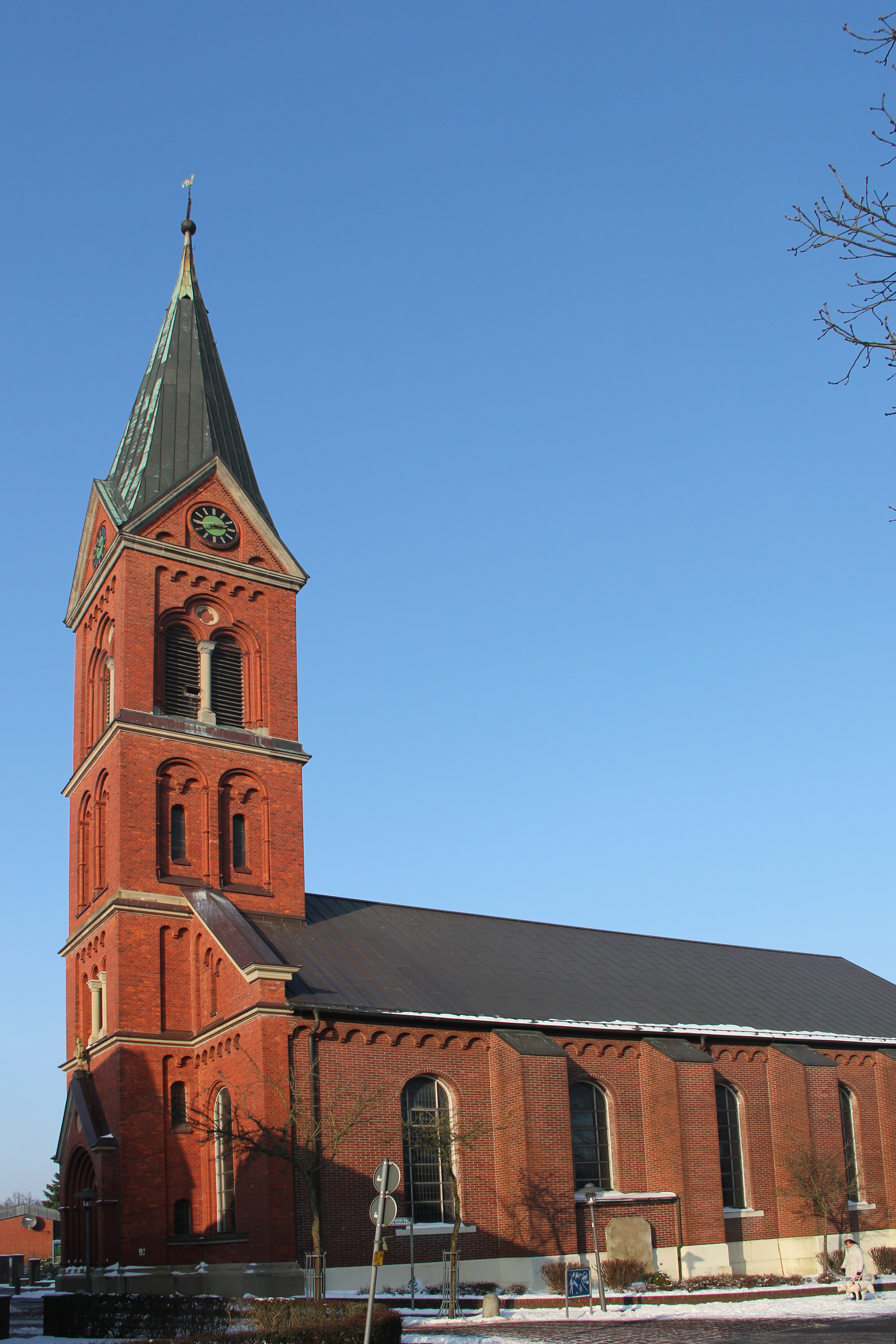 Katholische Kirche St. Peter und Paul in Wildeshausen